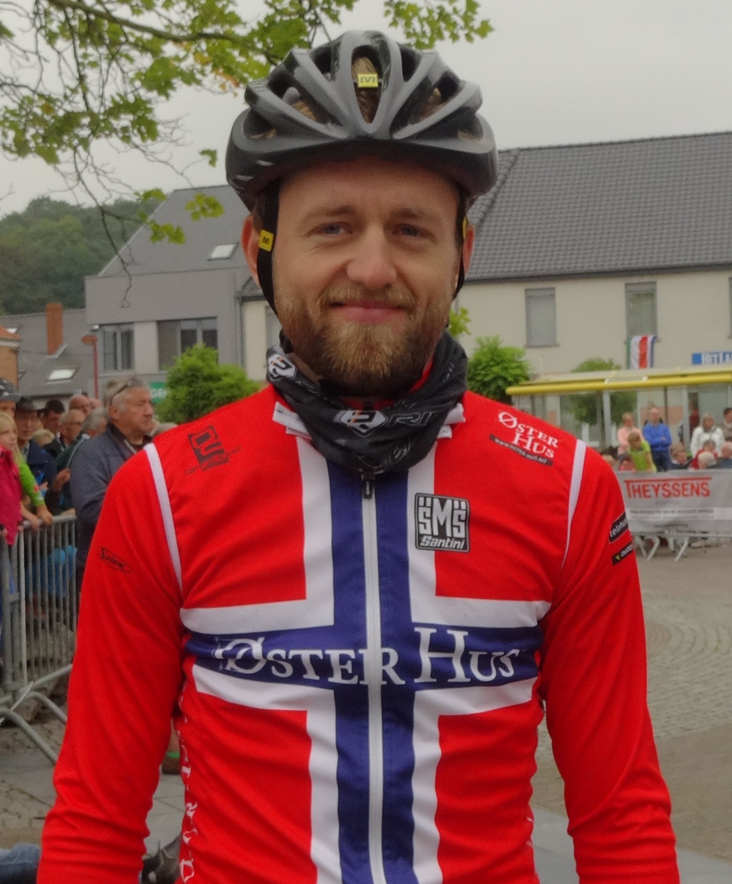 Reportage photographique réalisé le mercredi 27 août à l'occasion du départ de la Druivenkoers Overijse 2014 à Huldenberg, Belgique.